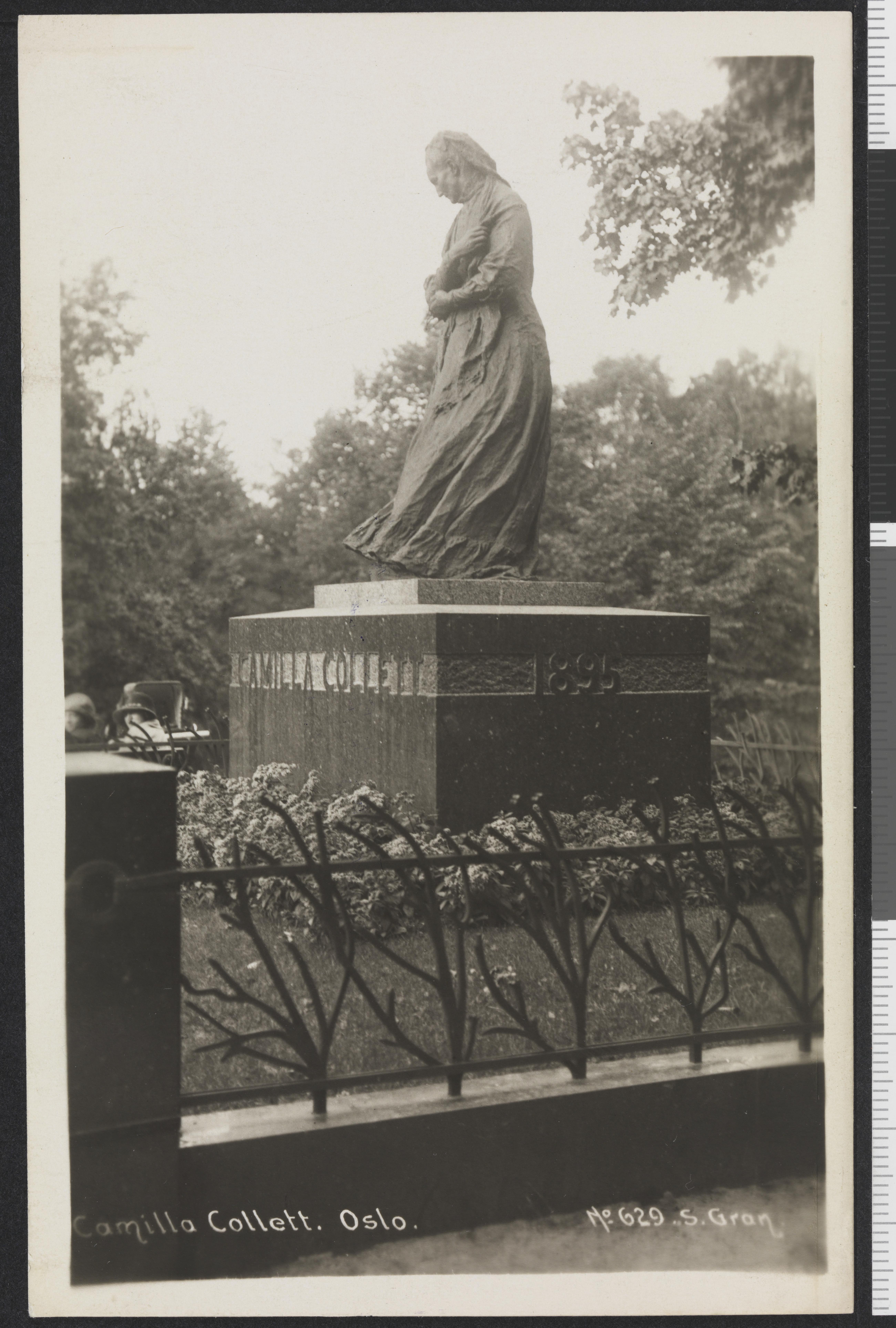 Bildet er hentet fra Nasjonalbibliotekets bildesamling Slottsparken, Oslo, Oslo